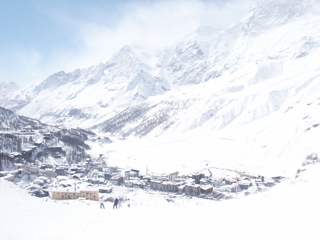 Cervinia, Valle d'Aosta, Italia